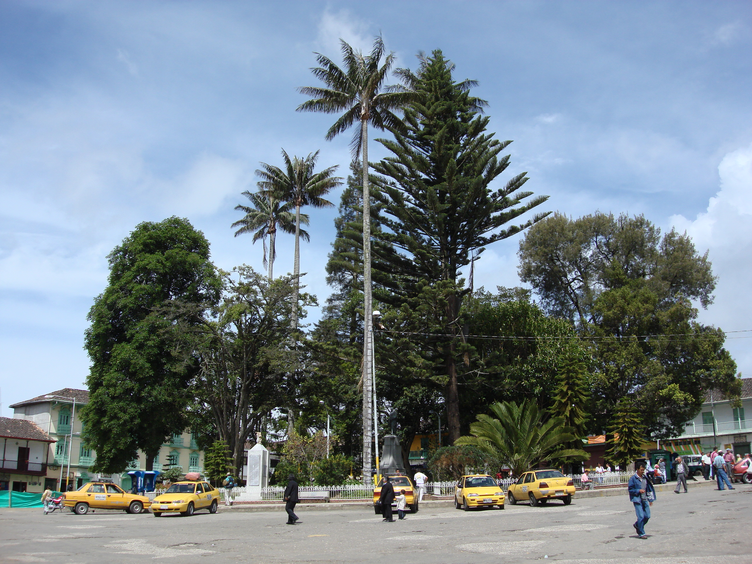 Plaza principal de Sonson, abril-2007